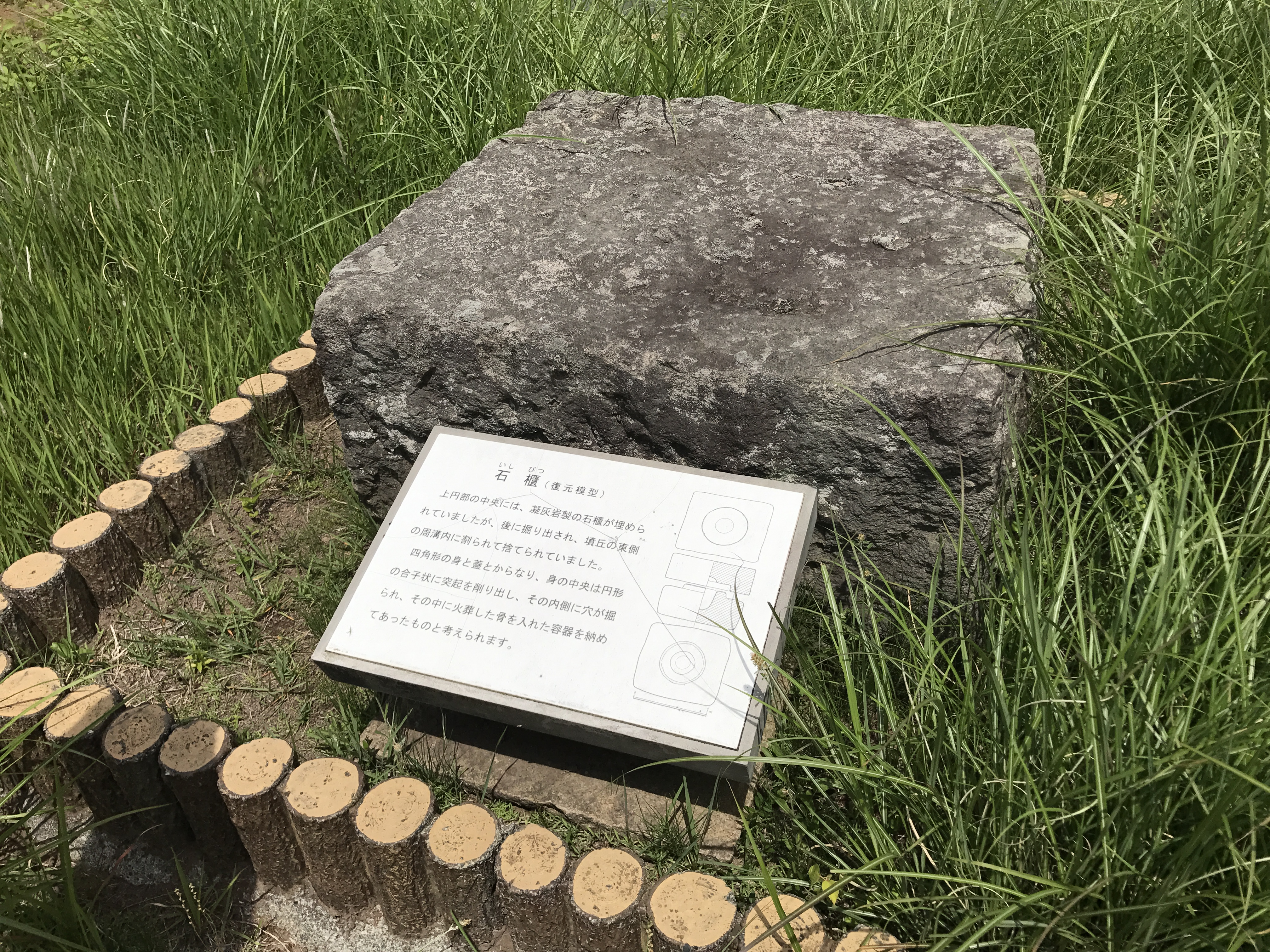 清水柳北１号古墳の石櫃